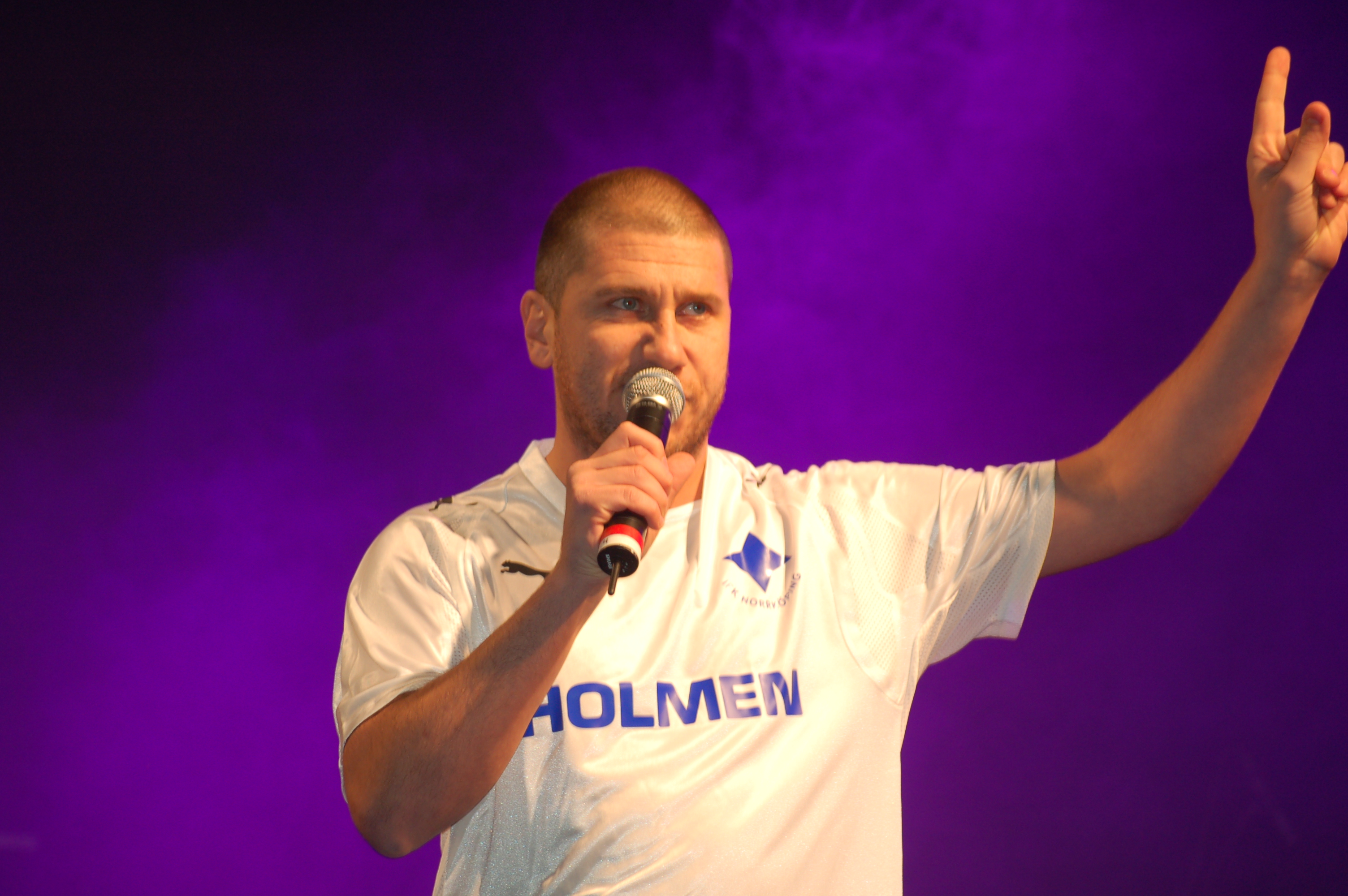 Markoolio besöker Norrköping, Han Hejar på IFK Norrköping.